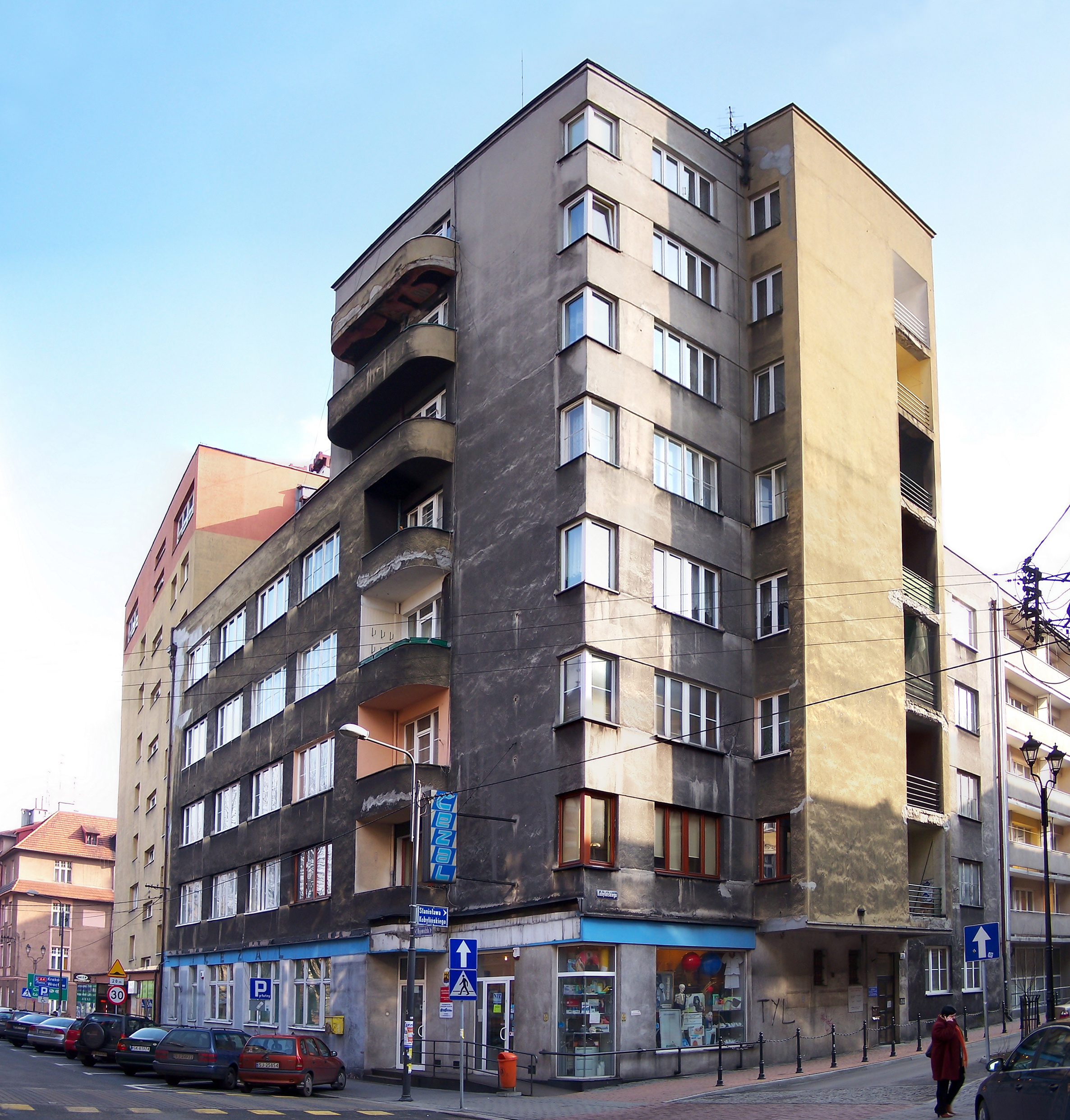 Dom mieszkalny profesorów Śląskich Technicznych Zakładów Naukowych przy ul. Wojewódzkiej 23 w Katowicach. Wzniesiony w latach 1929-31 przy użyciu nowoczesnej konstrukcji stalowej.